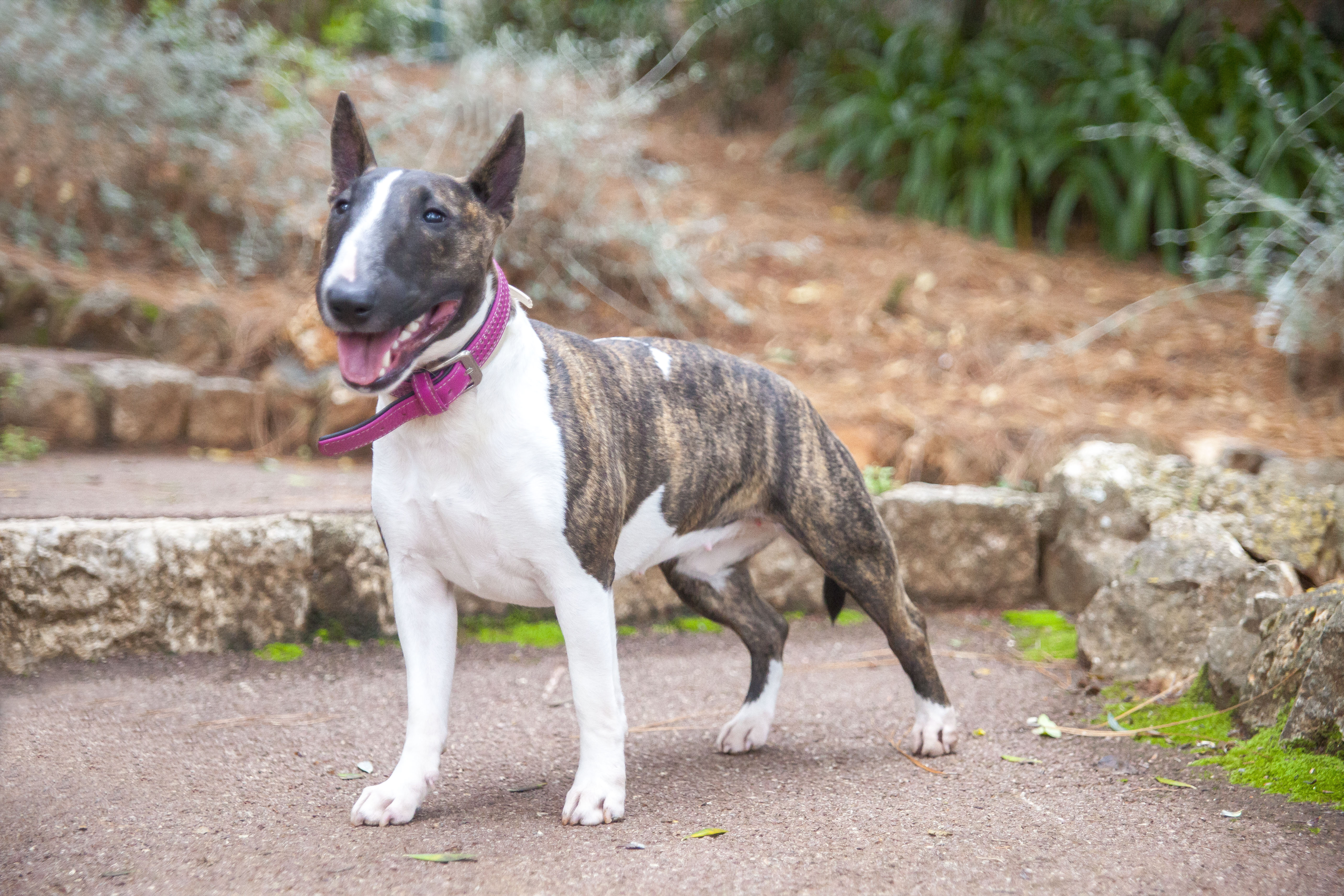 Bull-Terrier miniature femelle adulte